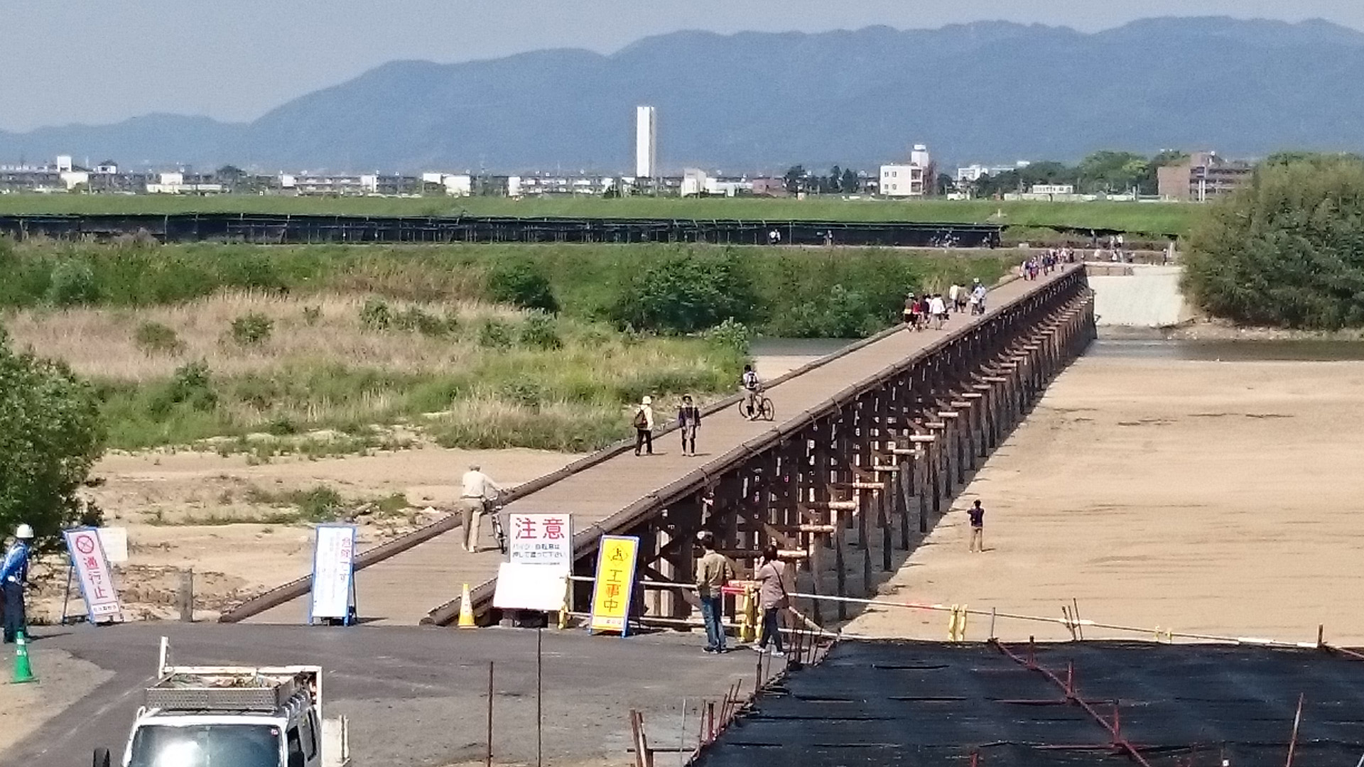 平成27年度の復旧工事後 2016年４月30日撮影